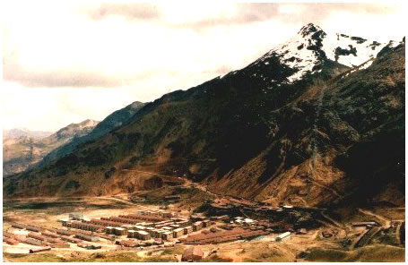 San Cristóbal - Campamento Minero Año 1998 La foto la tome hace muchos años, actualmente ya no luce así. Trataré de actualizar la foto, pero más adelante. Categoría:Perú (imagen)